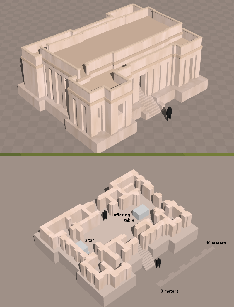 Niveau VII du "temple" d'Eridu, période d'Obeid finale.